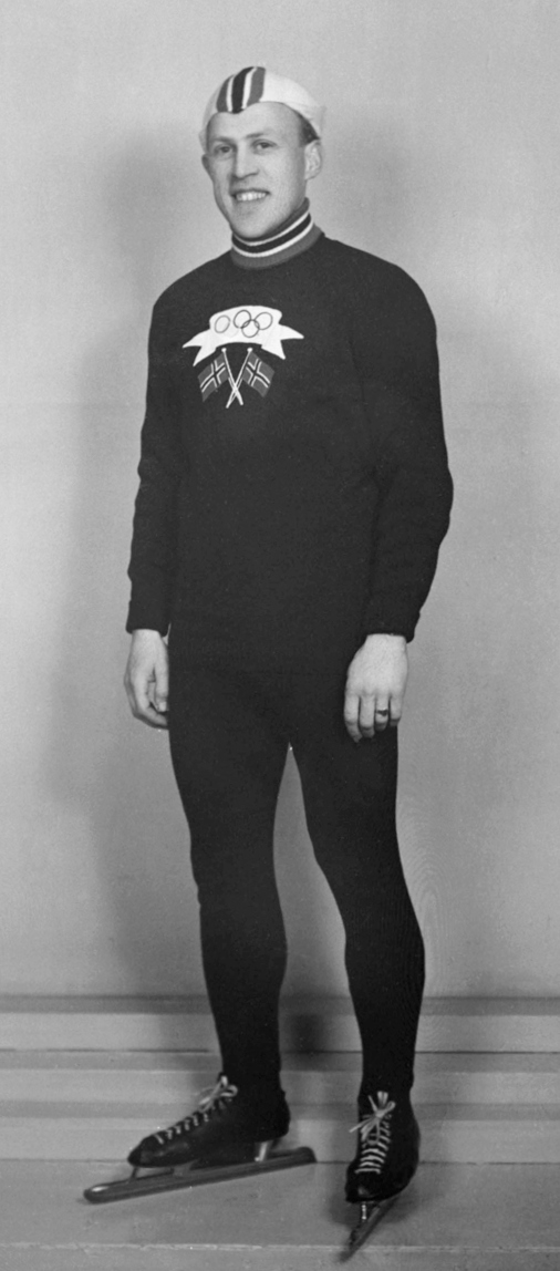 Torodd Hauer in Oslo